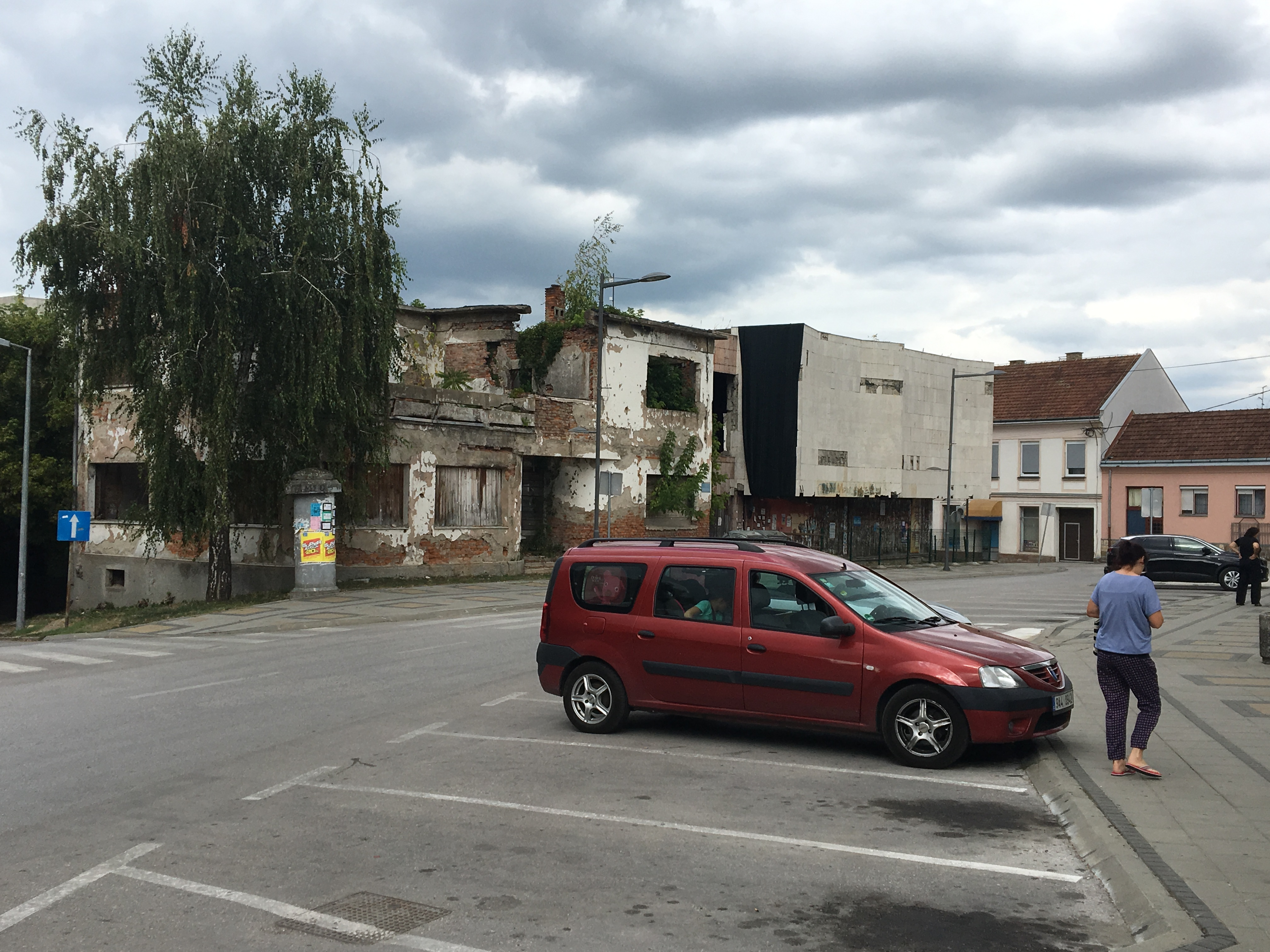 Náměstí v bosenskosrbské Derventě.